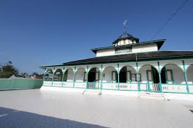 masjid Kasimuddin